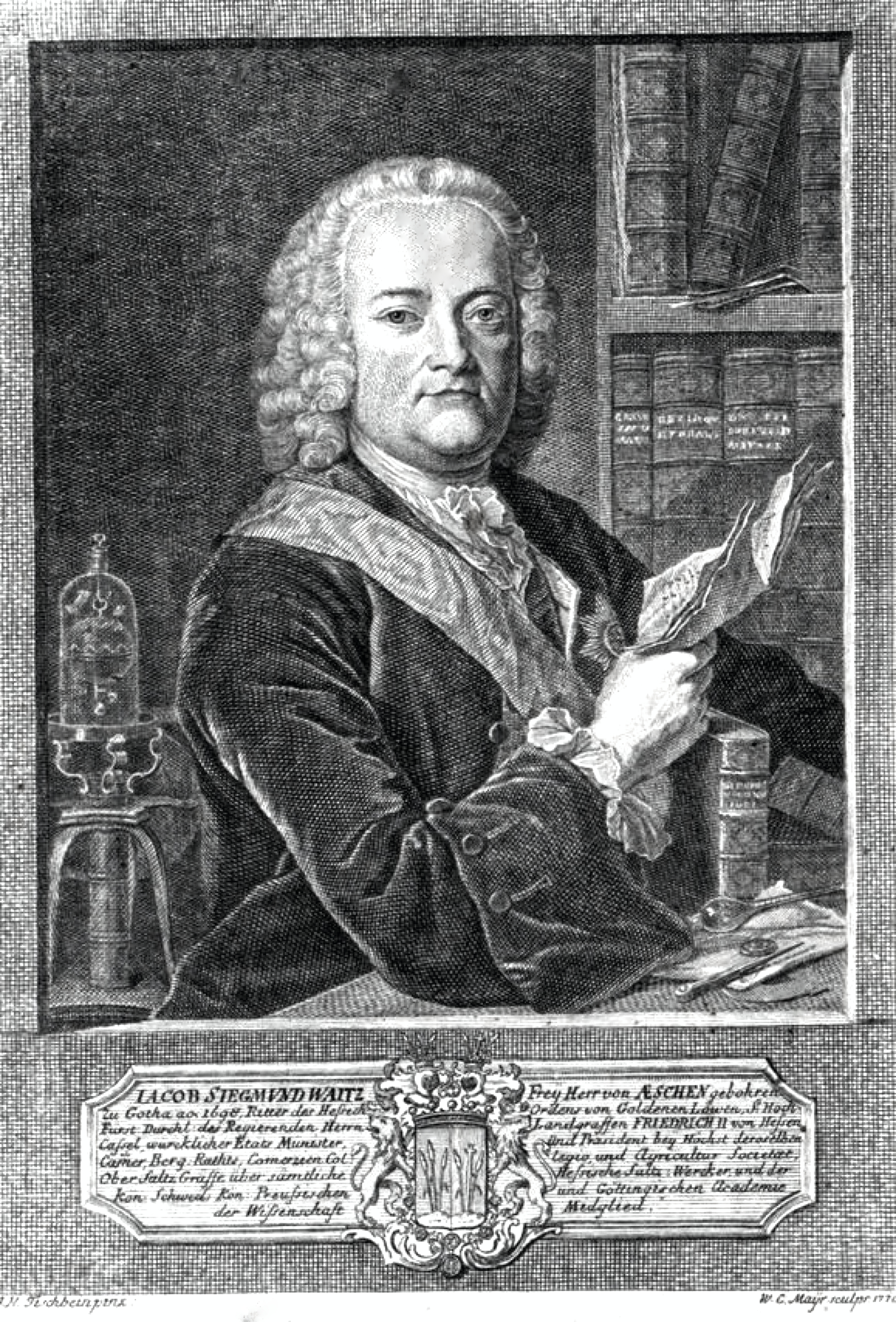 Jacob Sigismund Waitz von Eschen. Geboren 16. Mai 1698 in Gotha, verstorben 7. November 1776 in Berlin